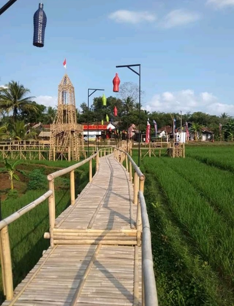 Wisata sawah KALIWUNGU